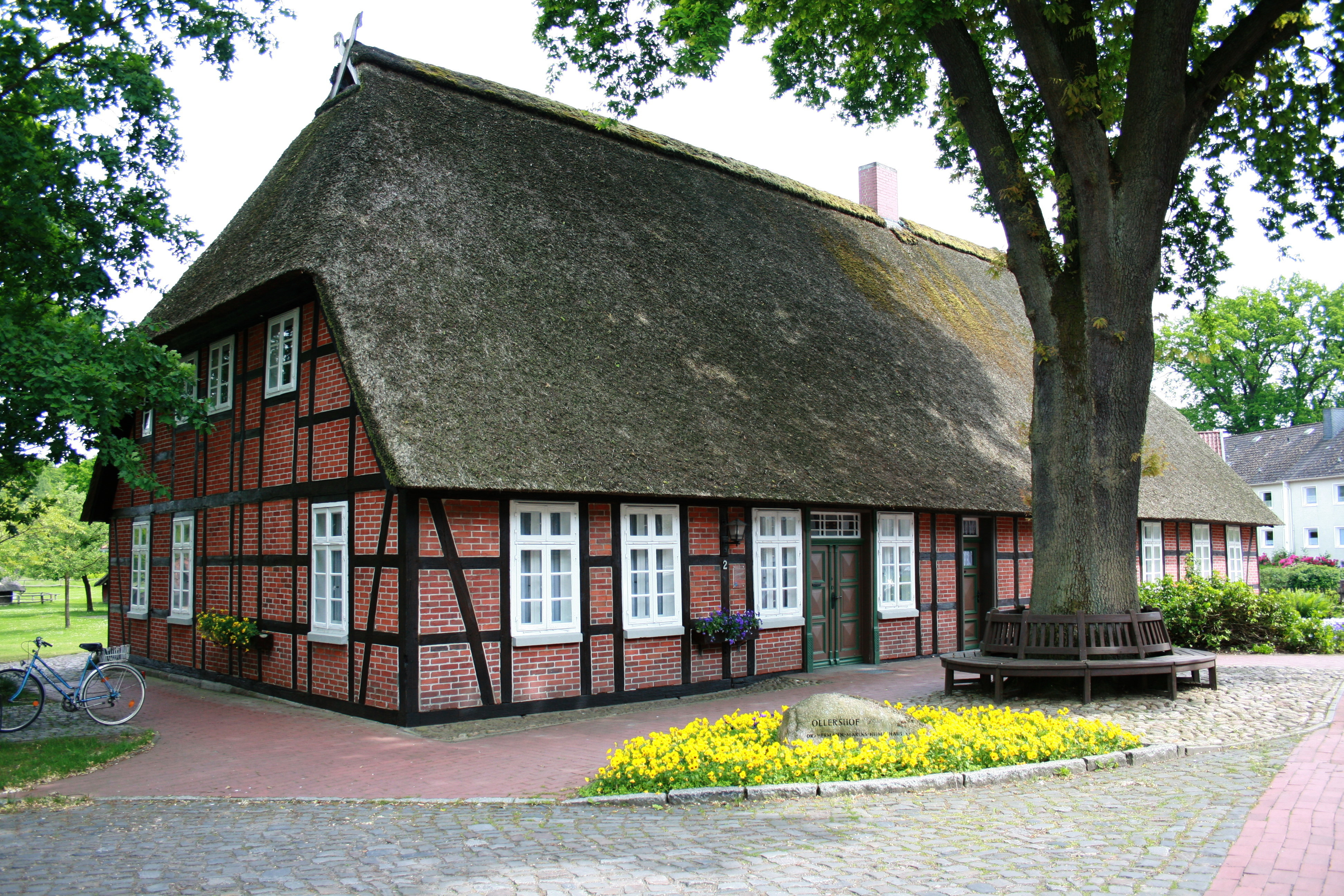 Ollershof in Munster (Örtze)